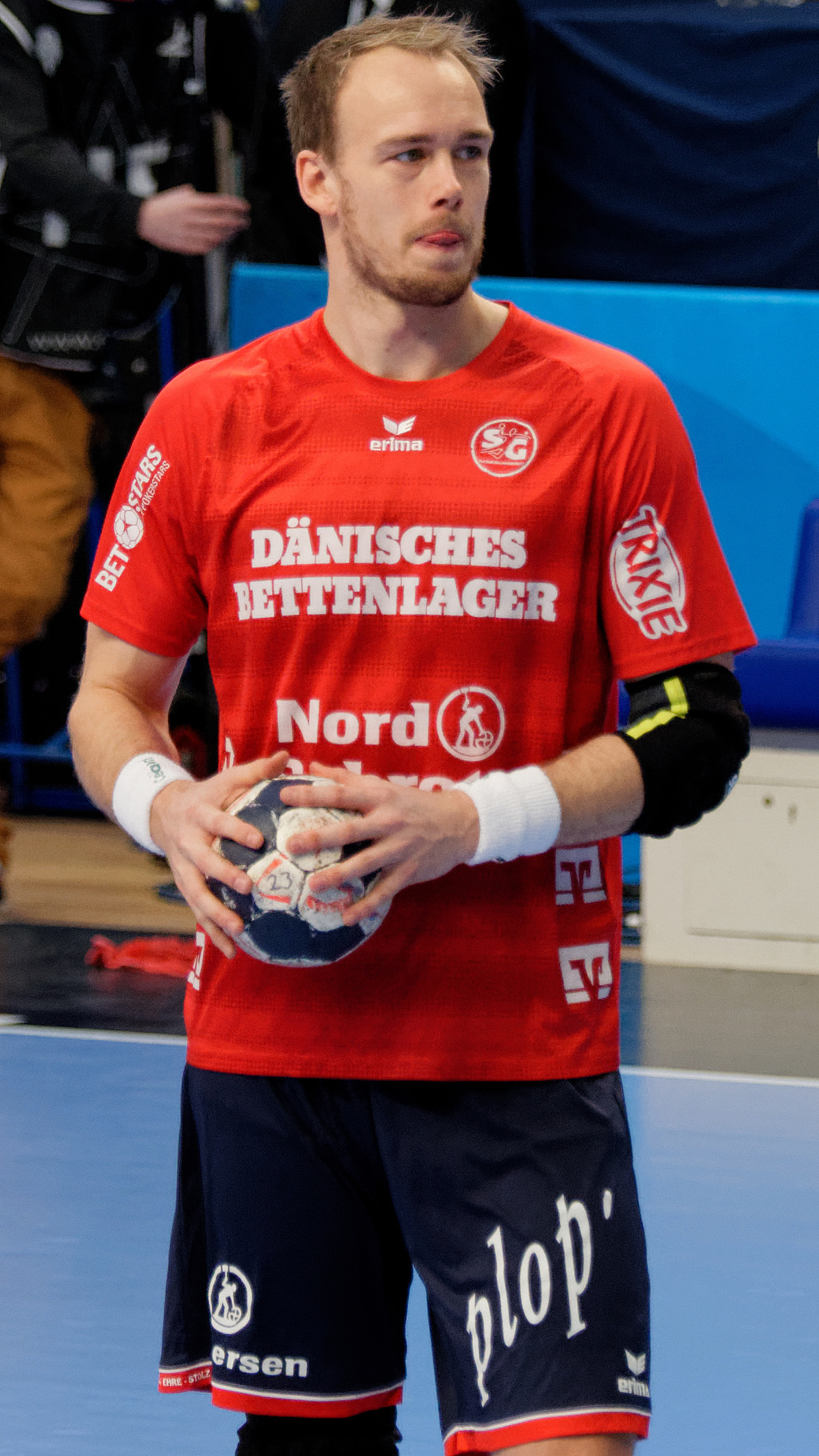 Rencontre de phase de groupe de la ligue des champions 2017/18 entre le PSG et SG Flensburg. A Coubertin, le 17 février 2018.